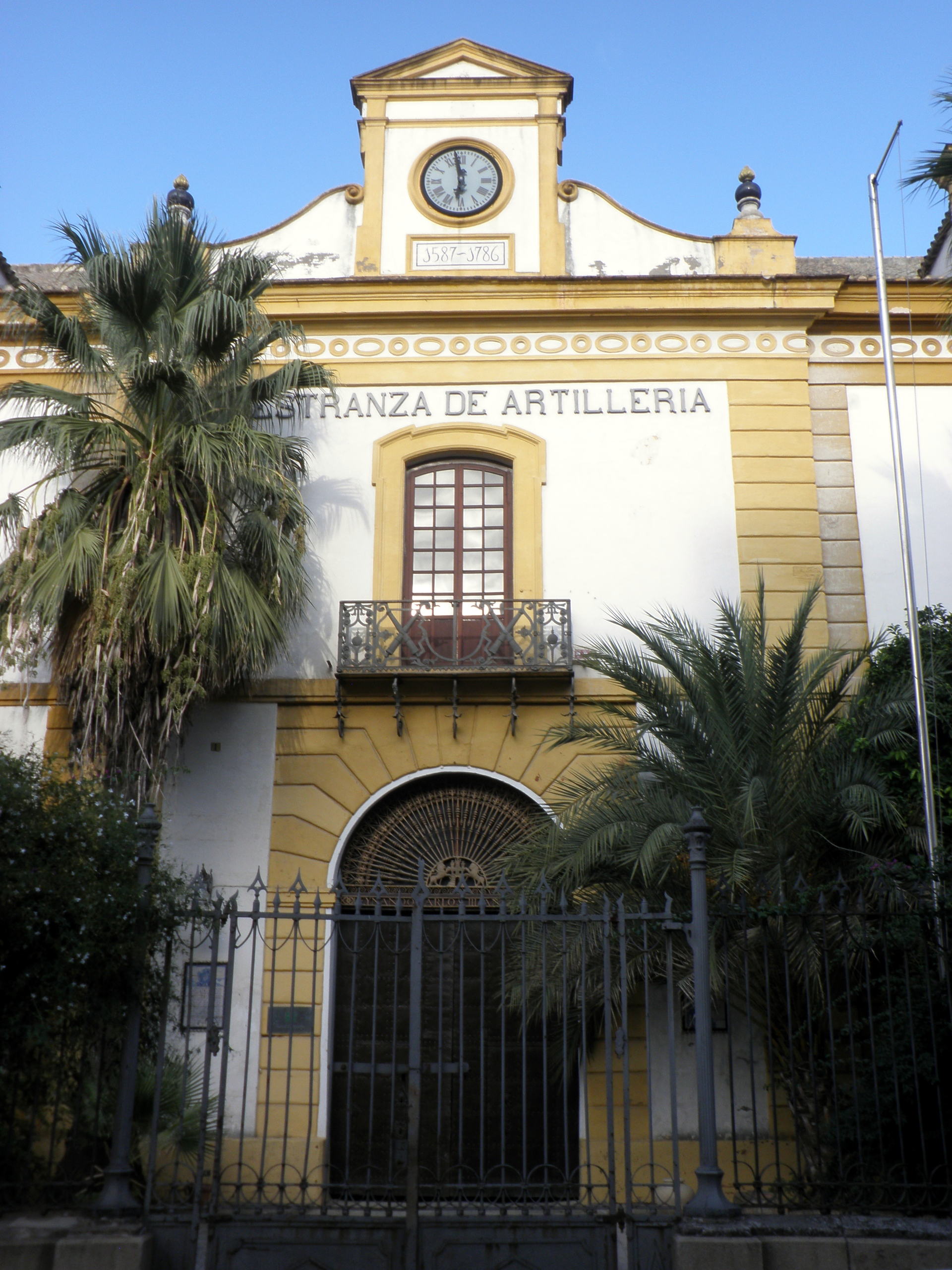 Edificio de las Antiguas Atarazanas Reales hoy Maestranza de Artillería, Sevilla, España.